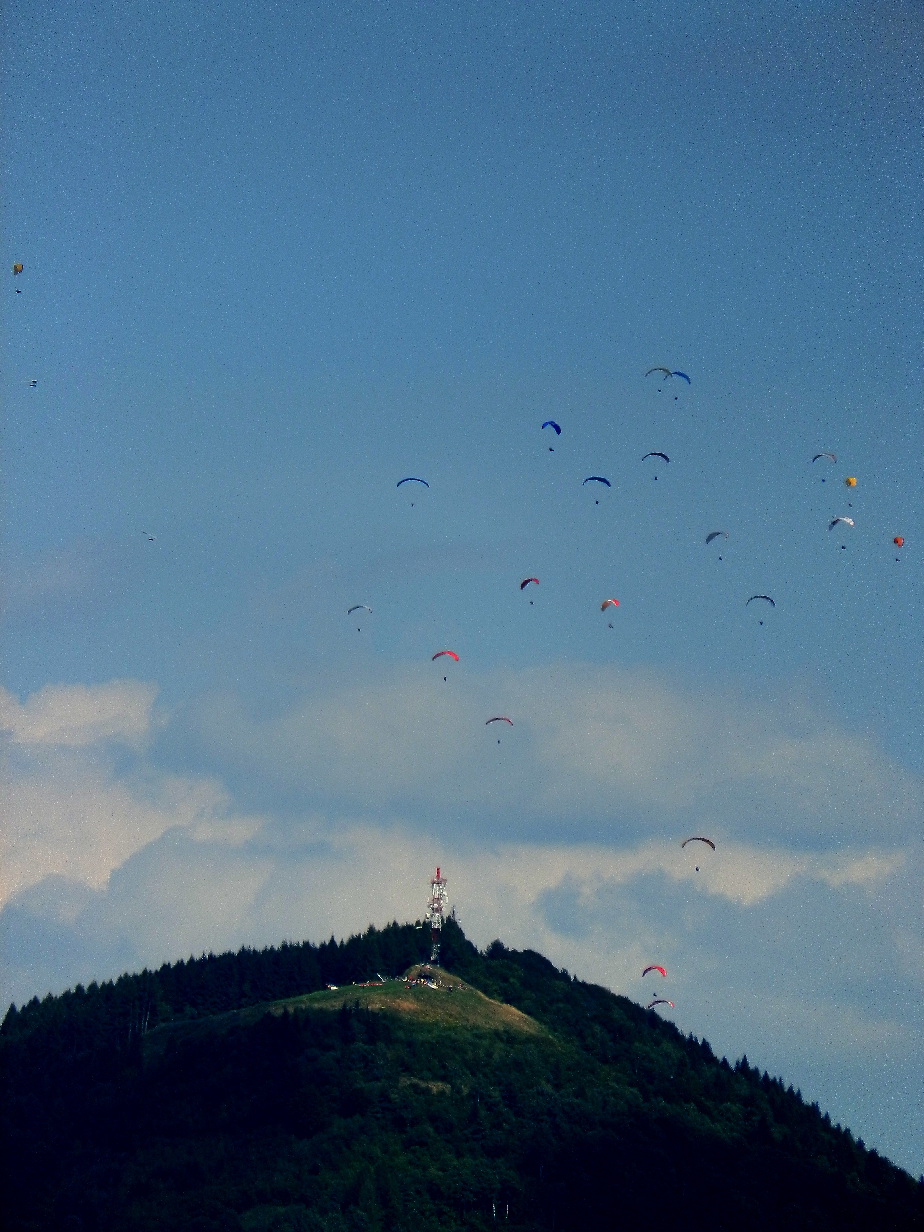 Nebo nad Stránikom